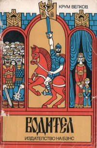 Предна корица на романа "Водител" на Крум Велков